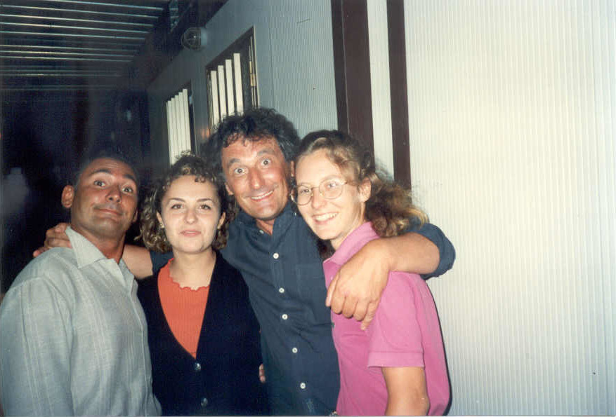 Francesco Paolantoni